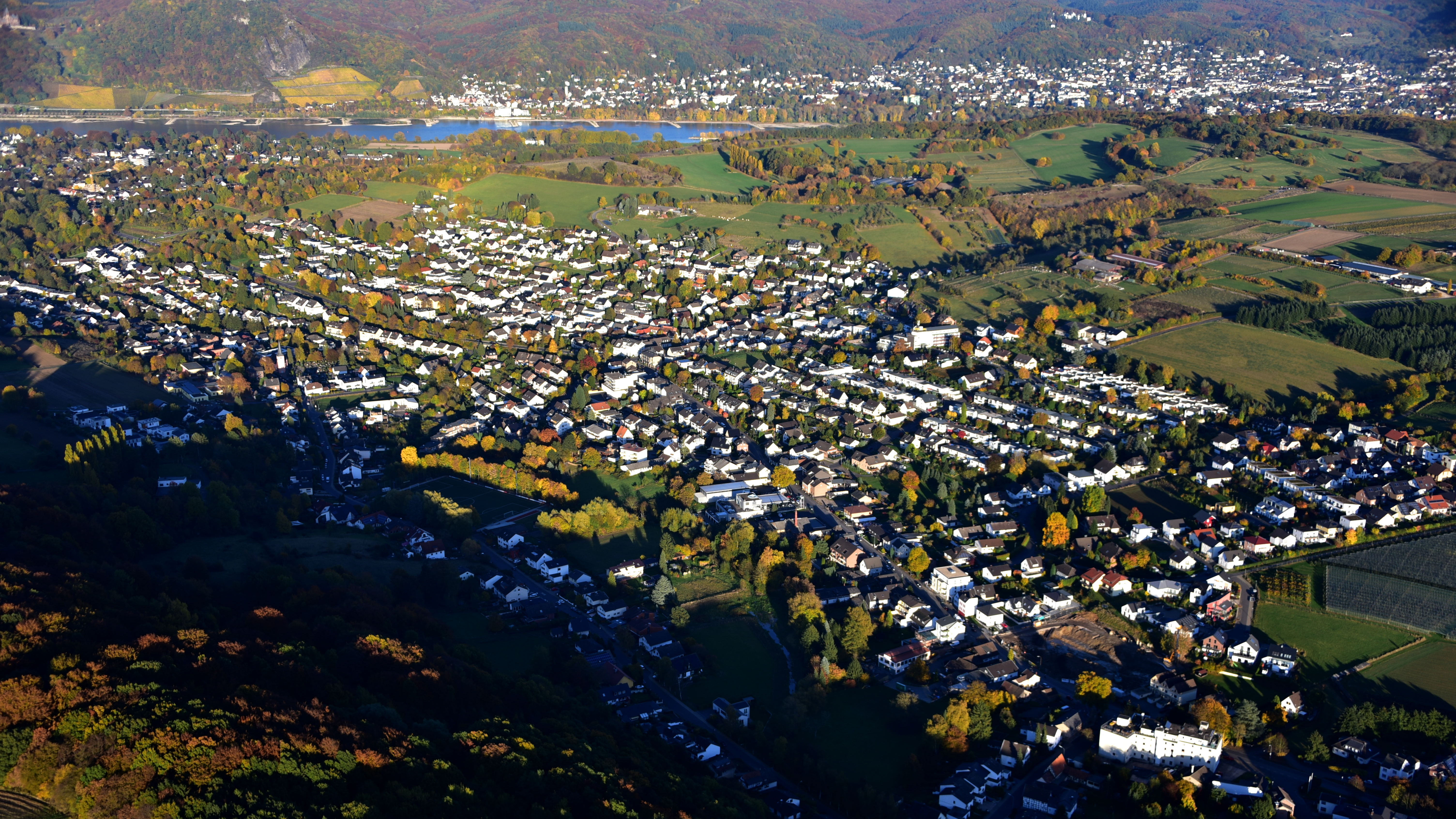 Niederbachem, Luftaufnahme (2016)